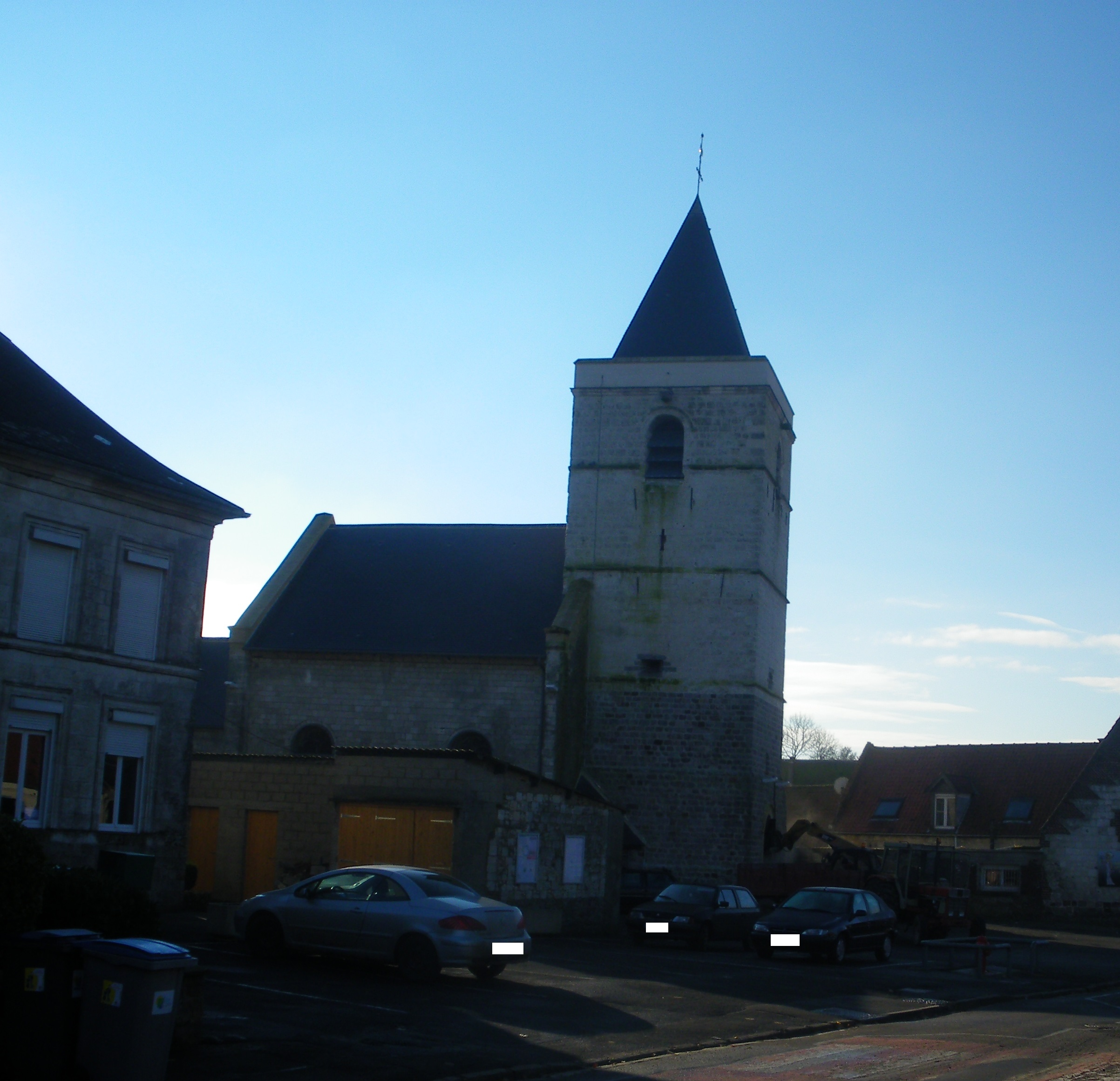 Vue de l'église d'Estrée-Cauchy.